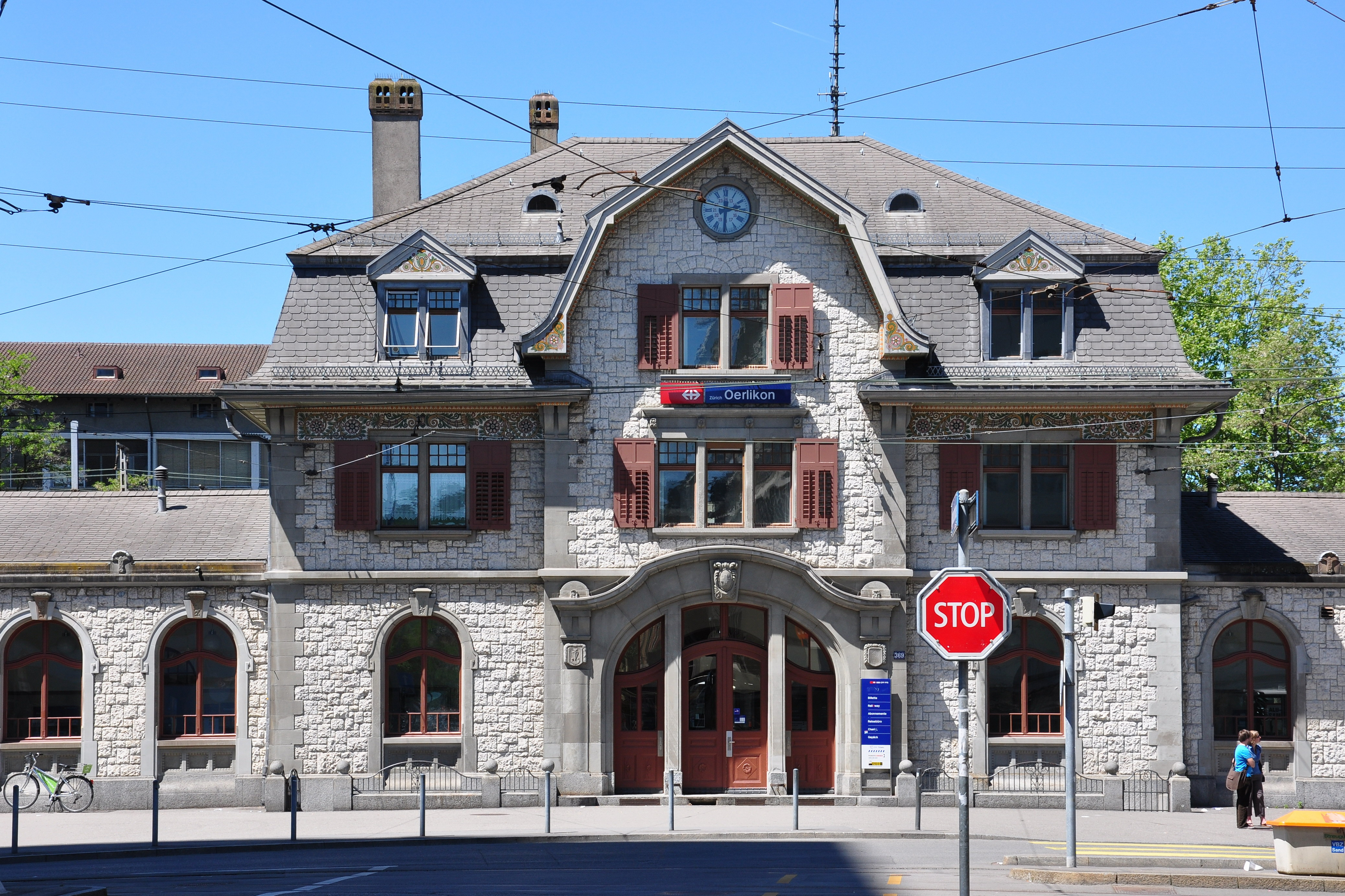 Zürich-Oerlikon train station (Switzerland)